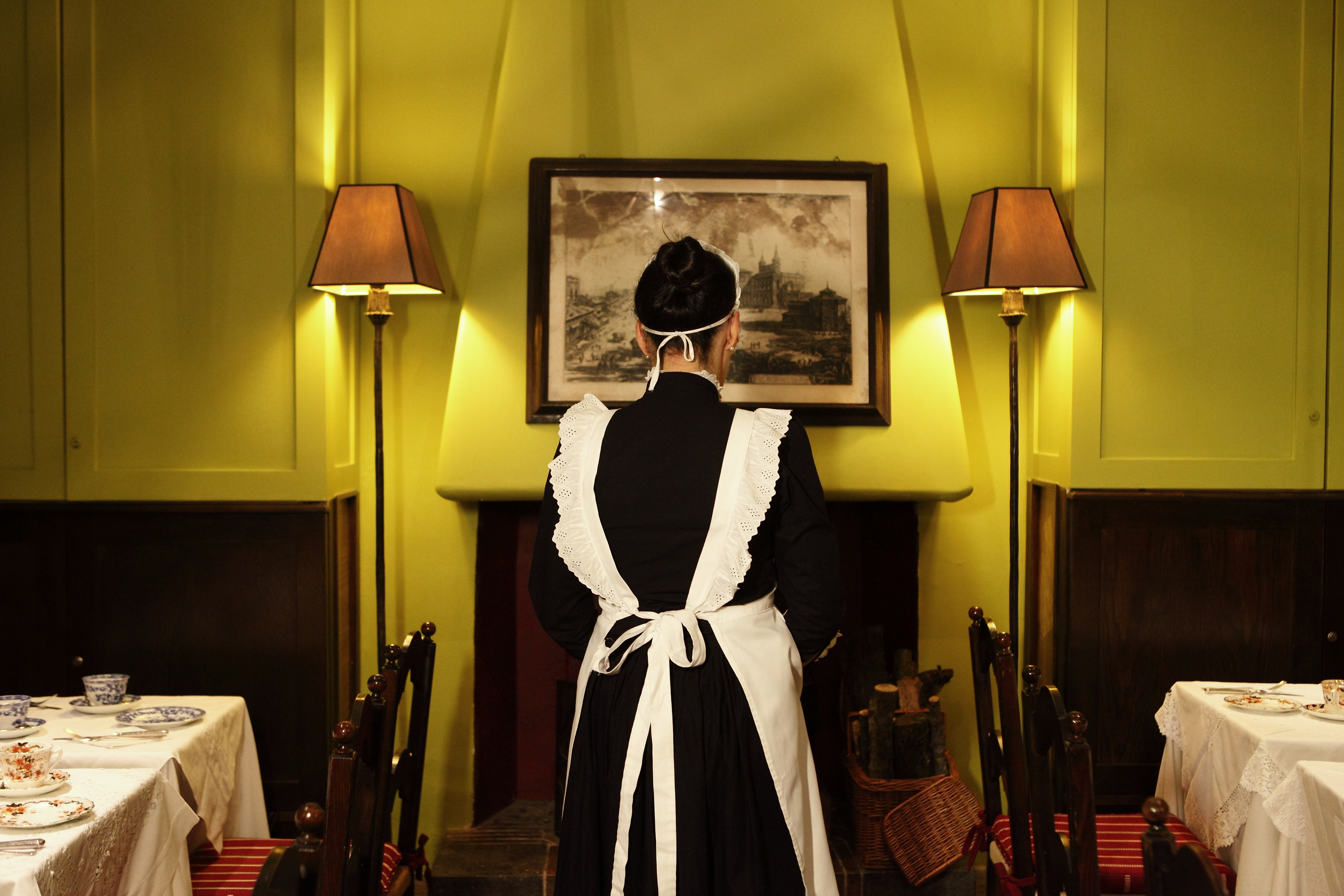 Zubereitung des Afternoon Tees